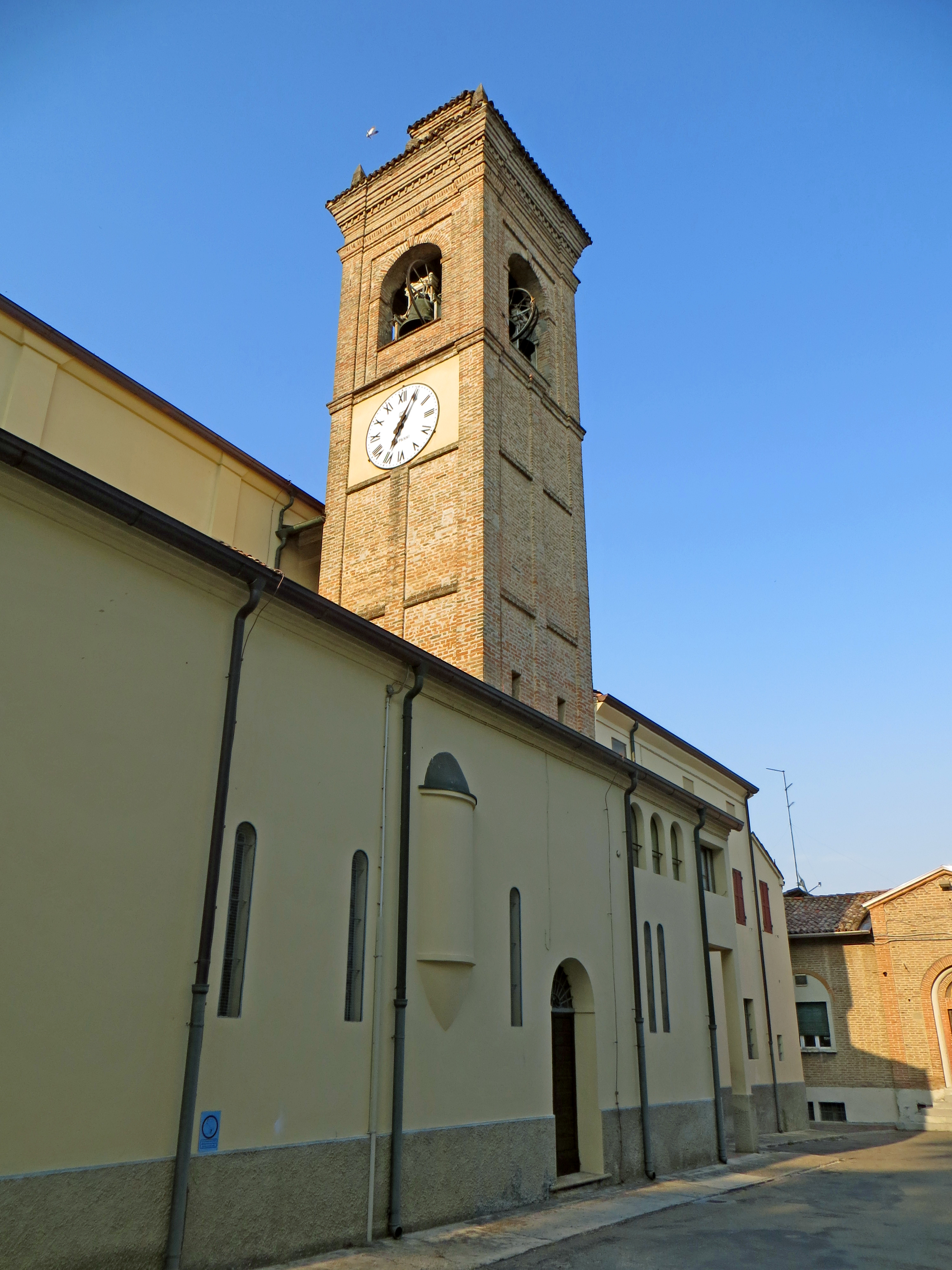 Chiesa di San Martino (Noceto) - lato sud e campanile